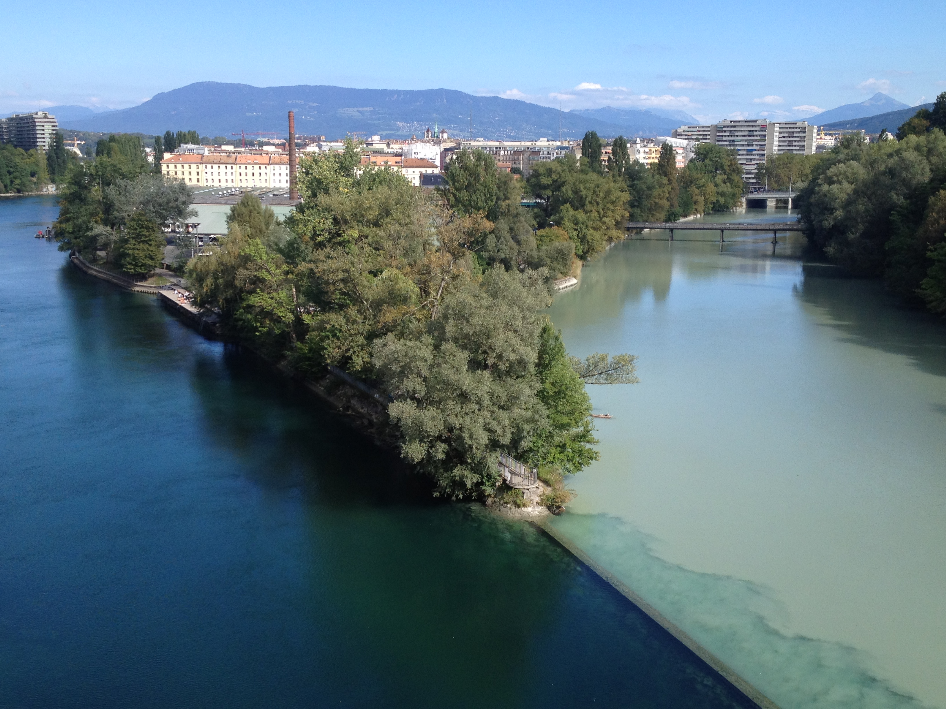 Jonction entre le Rhône et l'Arve à Genève